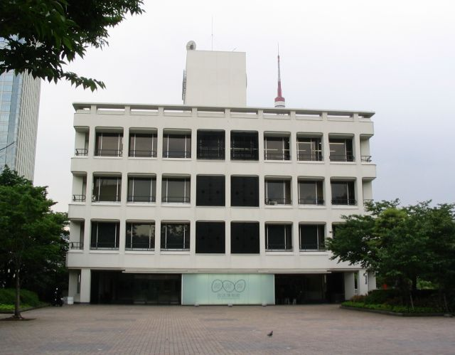 NHK放送博物館正面。建物の右奥に見えるのは東京タワーのアンテナ部分（デジタル放送アンテナから上部）。